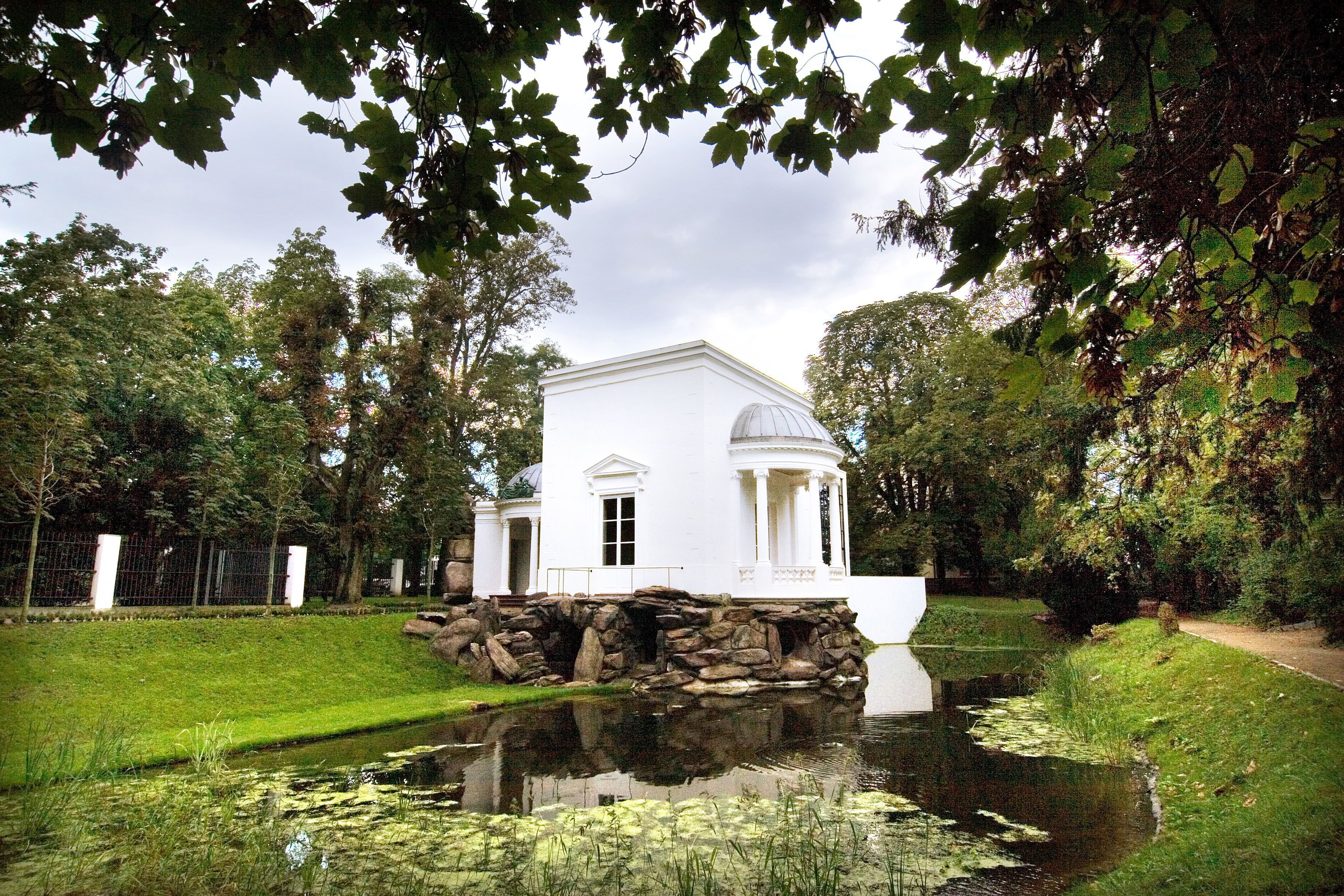 Der Lili-Tempel wurde ursprünglich 1798 als Badehaus am Main gebaut. Der Tempel erhielt den Namen angeblich nach der Verlobten Johann Wolfgang von Goethes, Elisabeth Schönemann, mit der sich dieser 1775 im umliegenden Park zu treffen pflegte. Außenaufnahme vom Metzler'scher Badetempel an der Mainstraße. Blick zum Tempel mit davorliegendem Gartenteich.